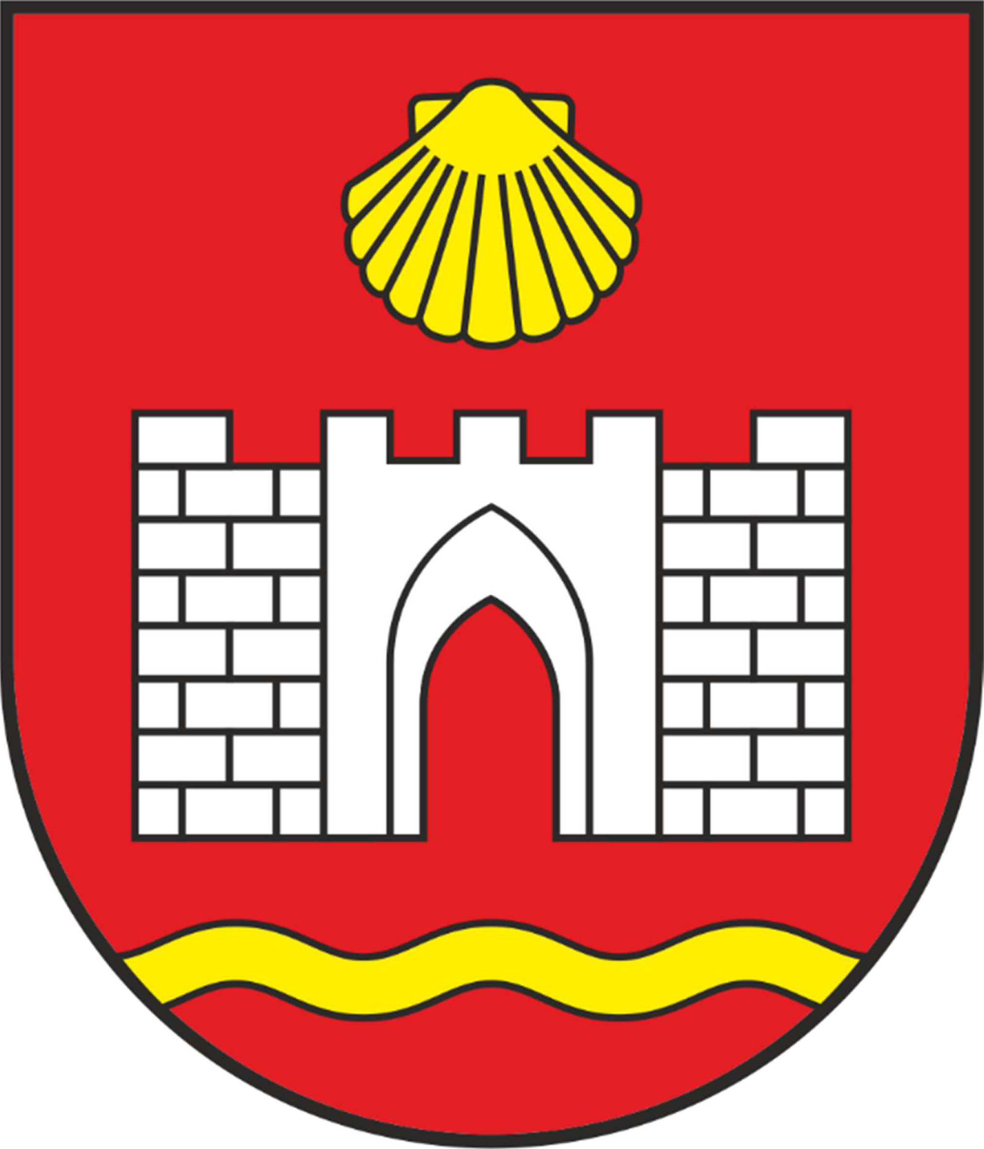 Herb gminy Wąpielsk